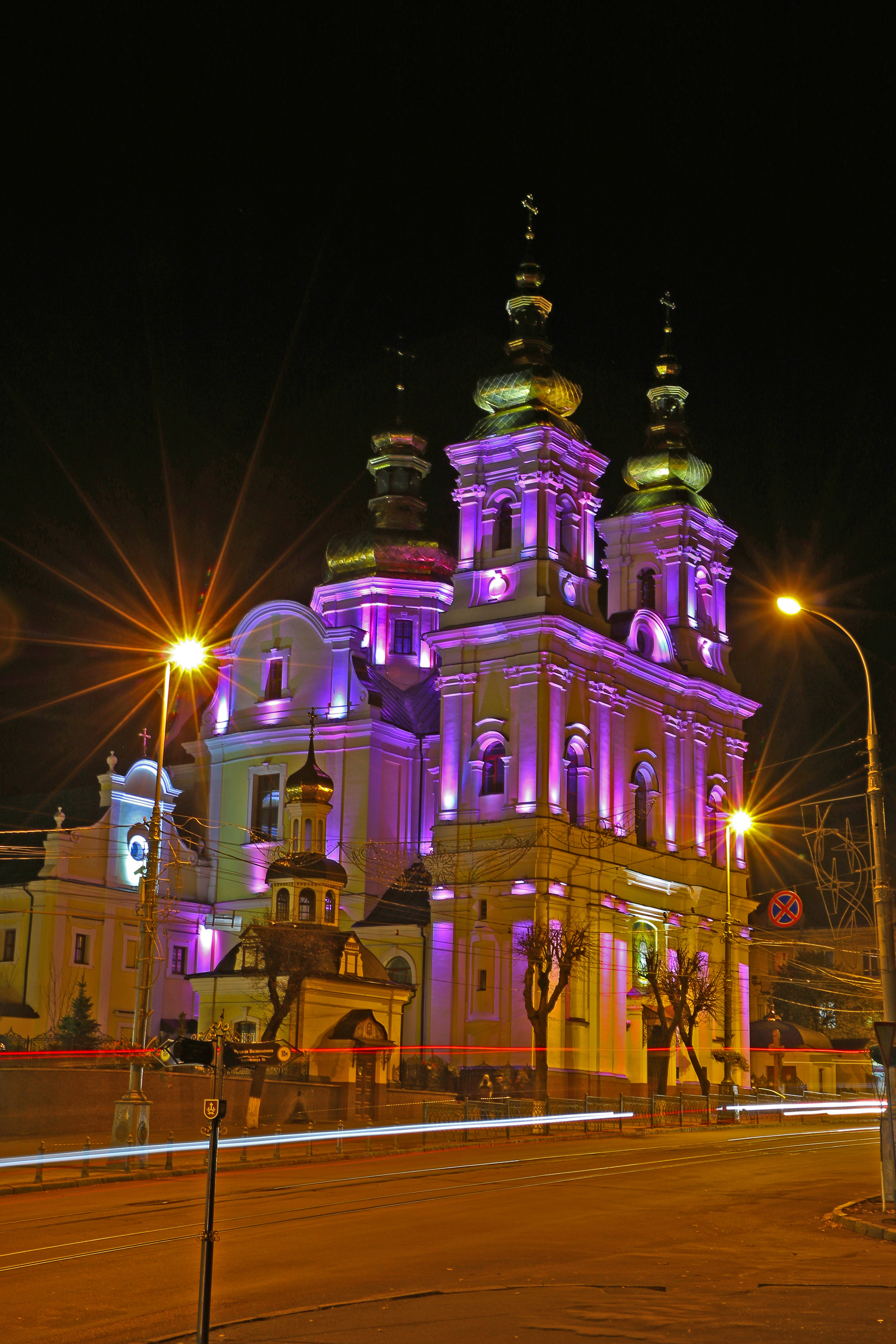 Домініканський монастир - Костьол, Вінниця, вул. Соборна, 23